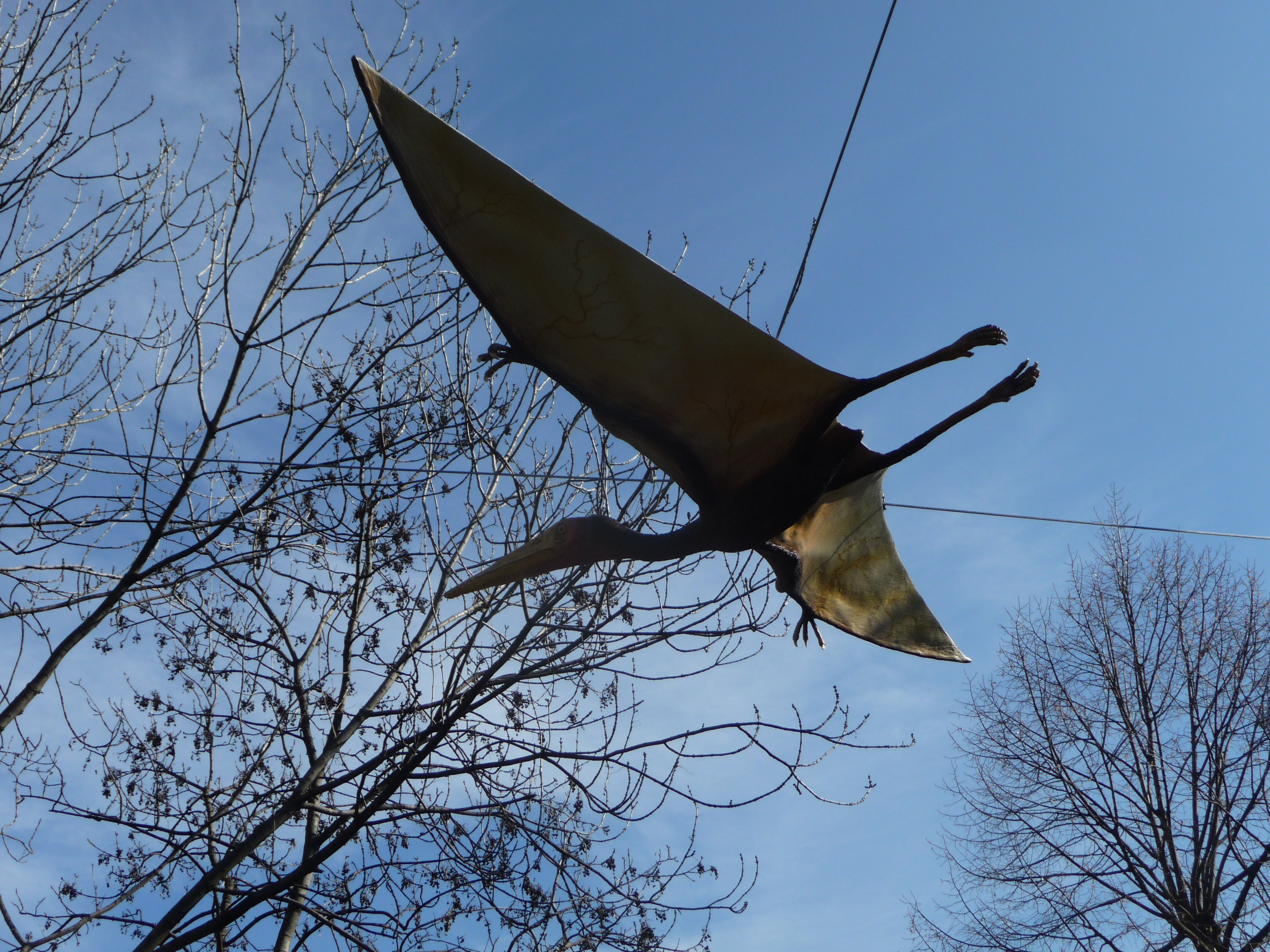 Pterodactylus szobra a Fővárosi Állat- és Növénykertben